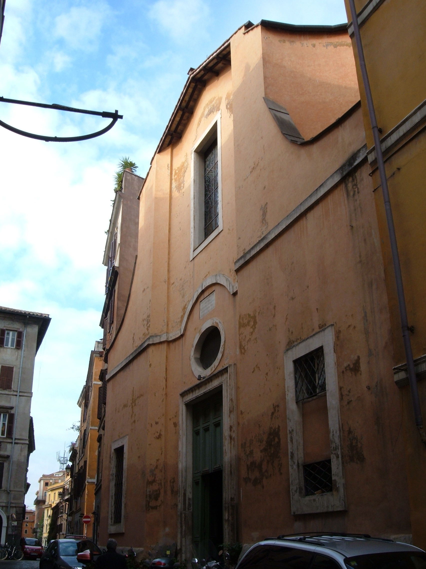 Chiesa di Santa Maria della Luce, a Roma, nel rione Trastevere.